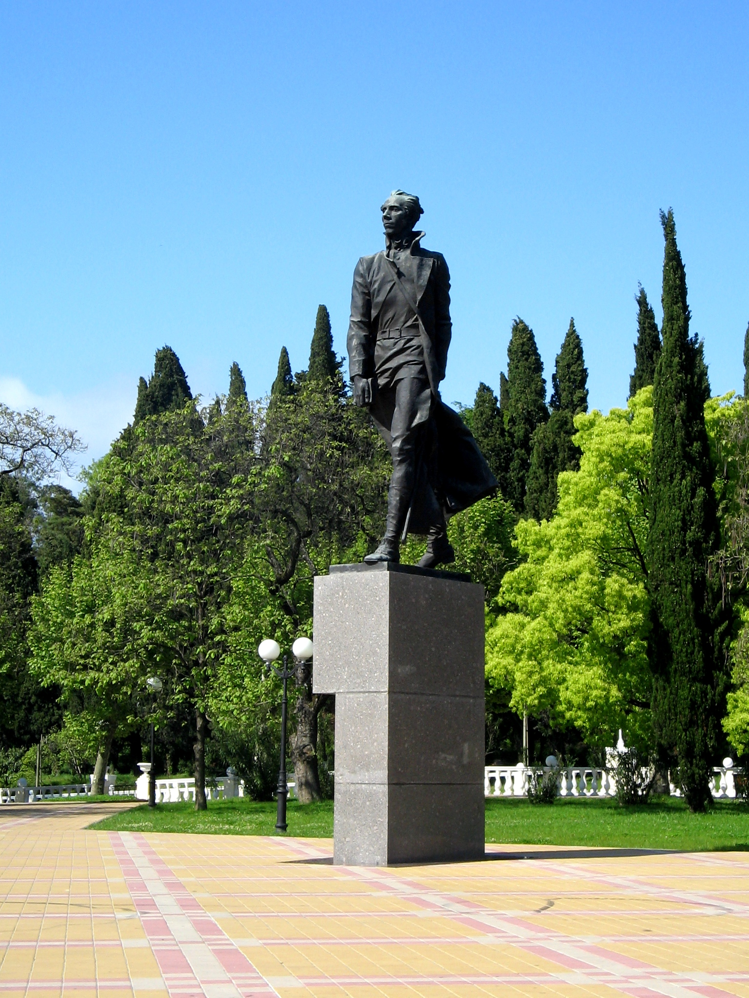 Памятник Островскому в Сочи